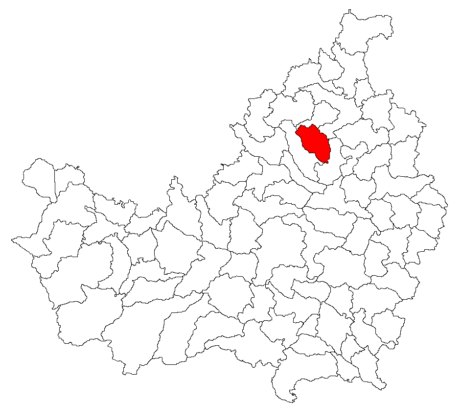 Categorie:Hărţi ale judeţului Cluj